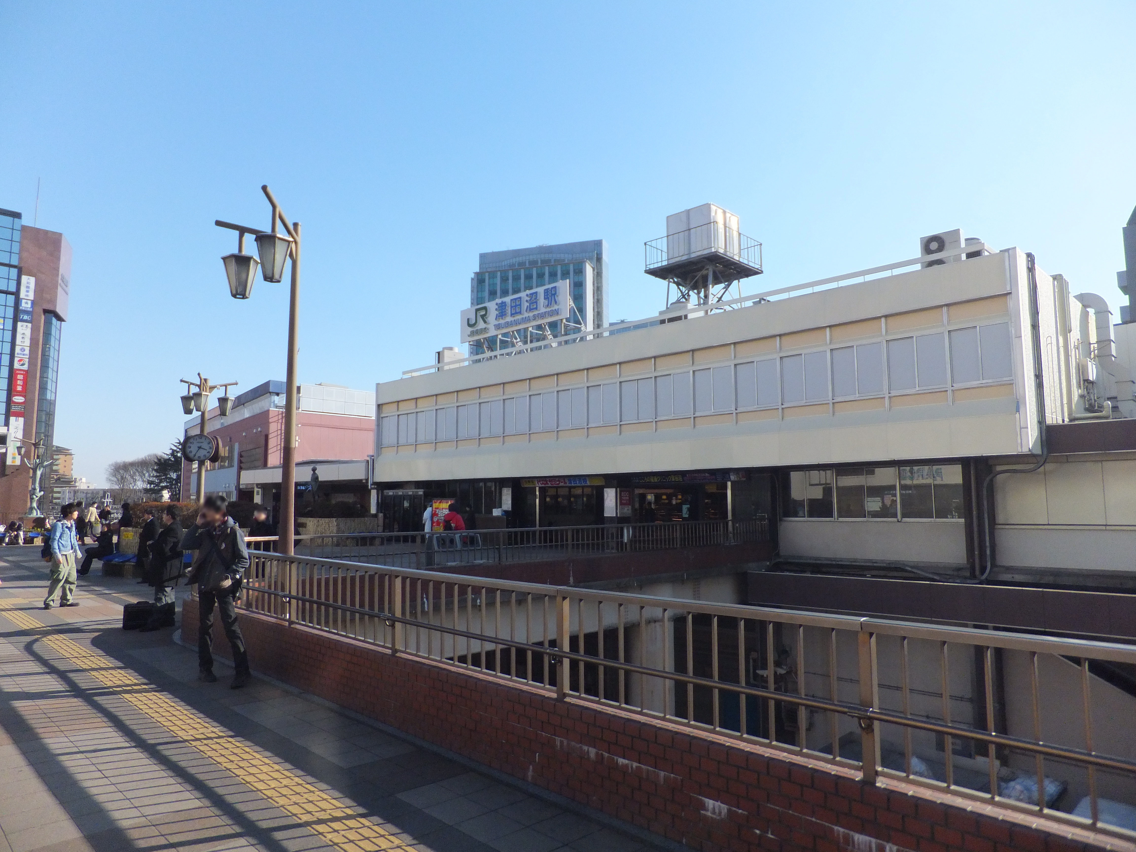 津田沼駅北口